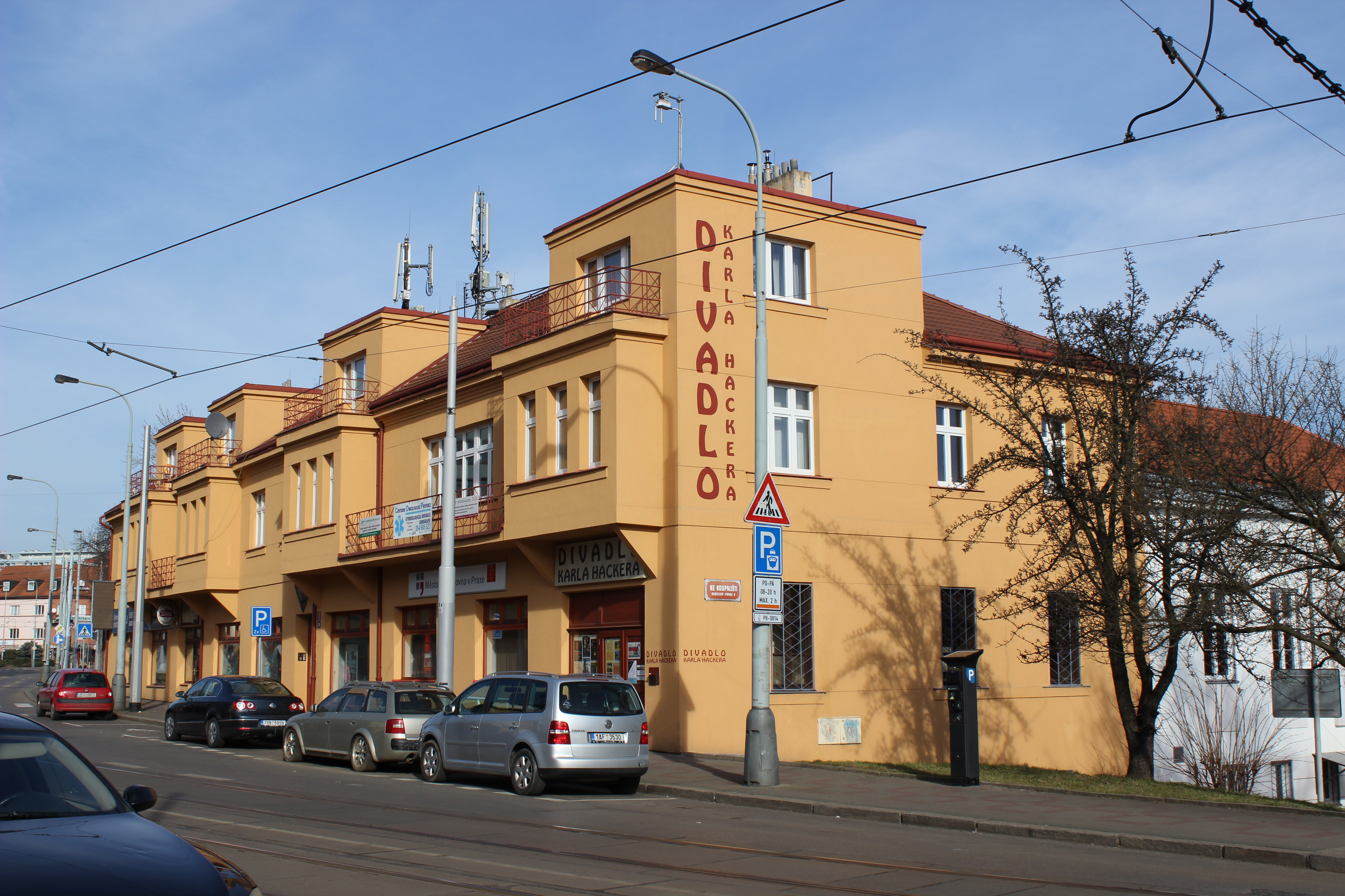 Budova pražského divadla Karla Hackera.